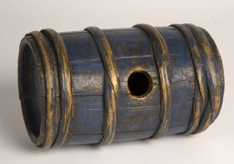 Lagget brennevinskagge datert 1739. Lengde 22 cm. Foto Anne-Lise Reinsfelt/Norsk Folkemuseum, NF.2003-0188.